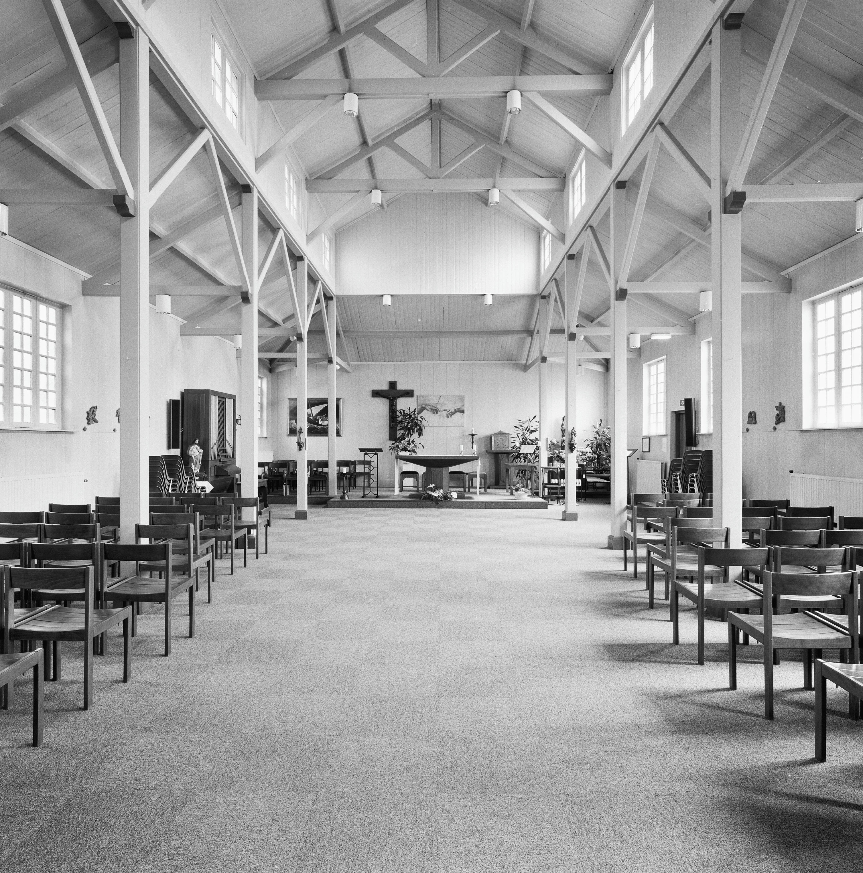 Sanatorium Hornerheide: Interieur Boskapel, overzicht naar het oosten met altaar (opmerking: Gefotografeerd voor Monumenten In Nederland Limburg)